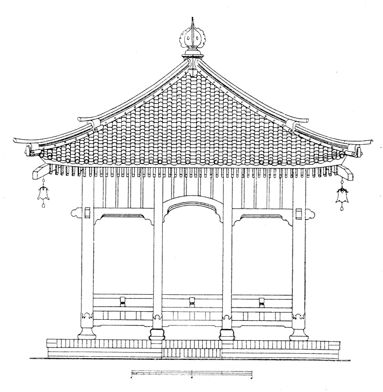 Botanical Garden in Berlin Native nameBotanischer Garten, Berlin-DahlemLocationBerlinCoordinates52° 27′ 18″ N, 13° 18′ 12.96″ E Established1899Website